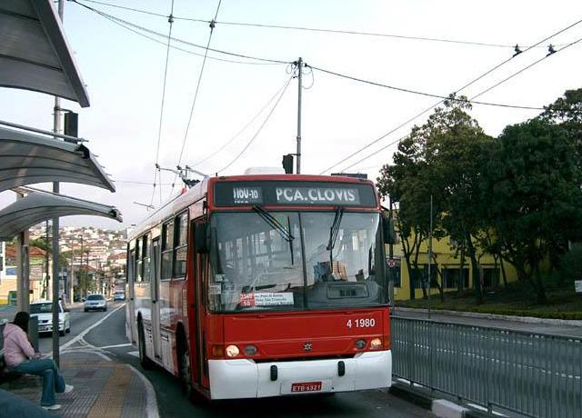 Trólebus Marcopolo/Volvo/Gevisa - Avenida Paes de Barros, São Paulo/SP, Brasil. Ricardo Milani